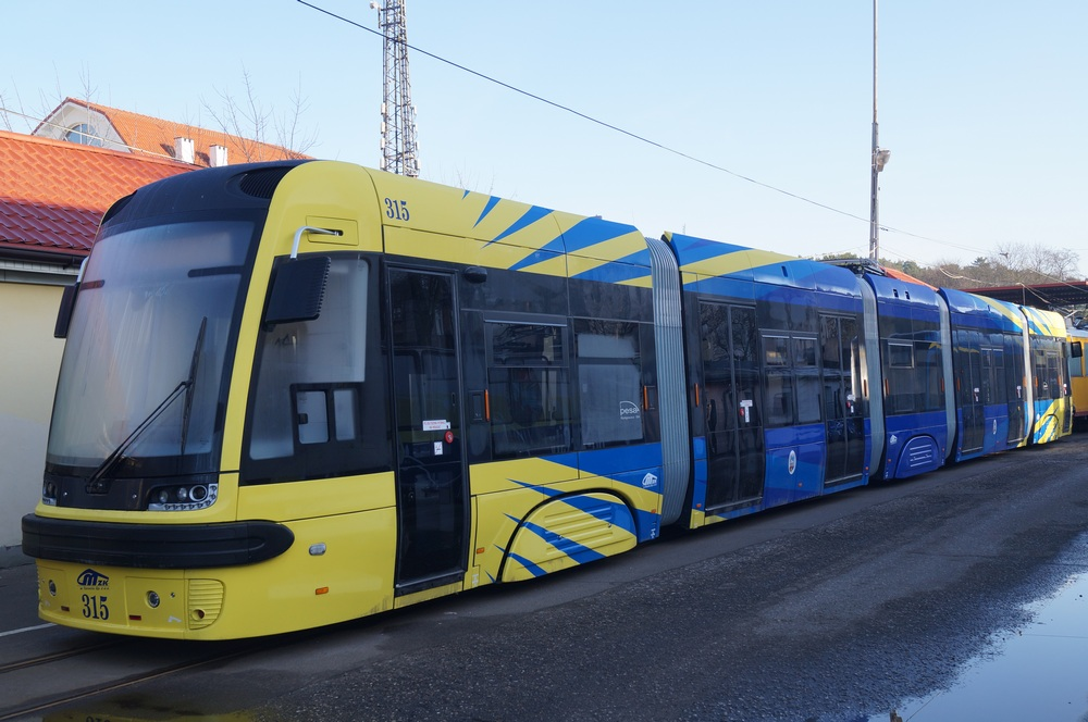 swing duo